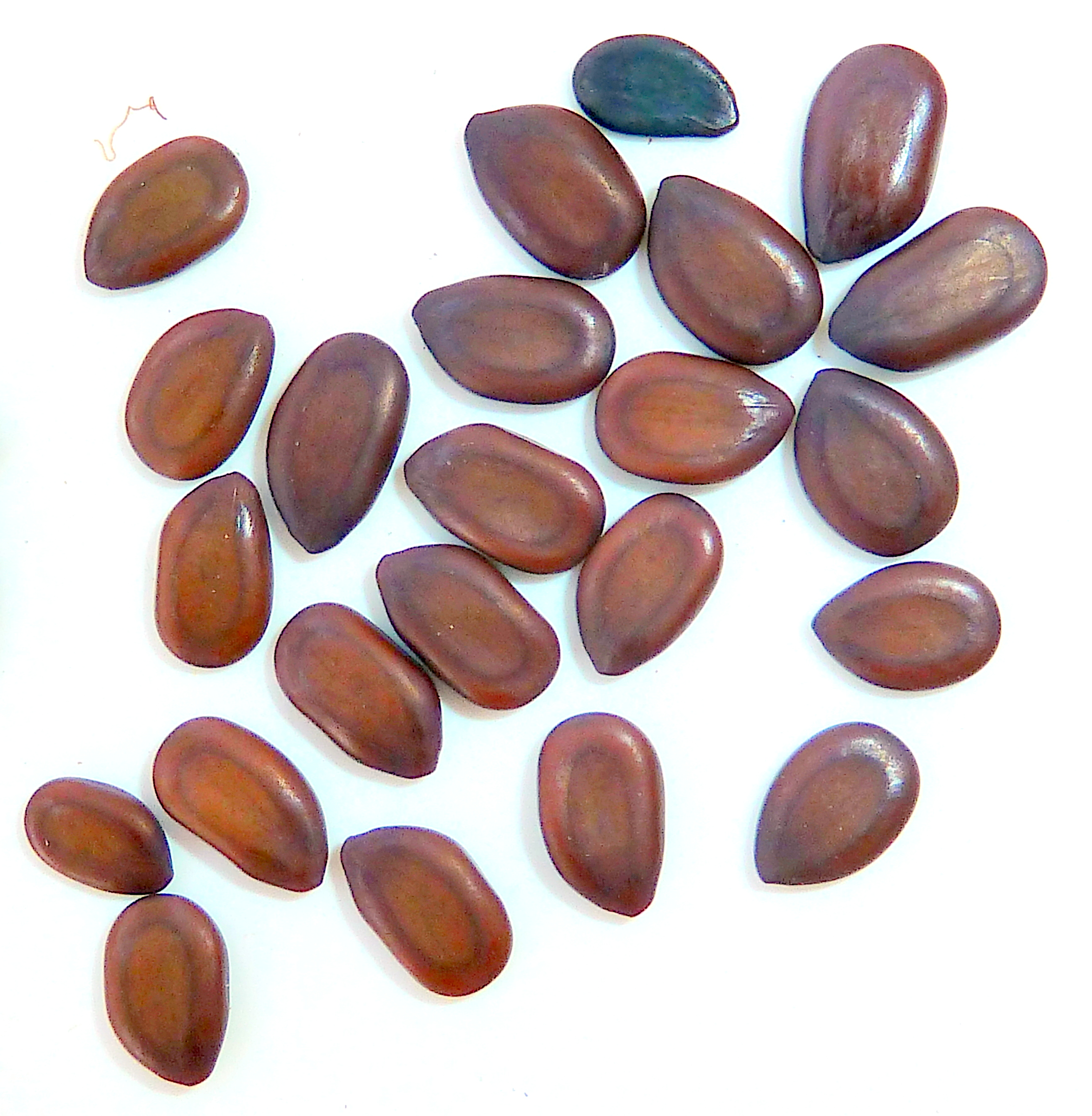 Leucaena leucocephala : Semillas - Águilas (Murcia, España).